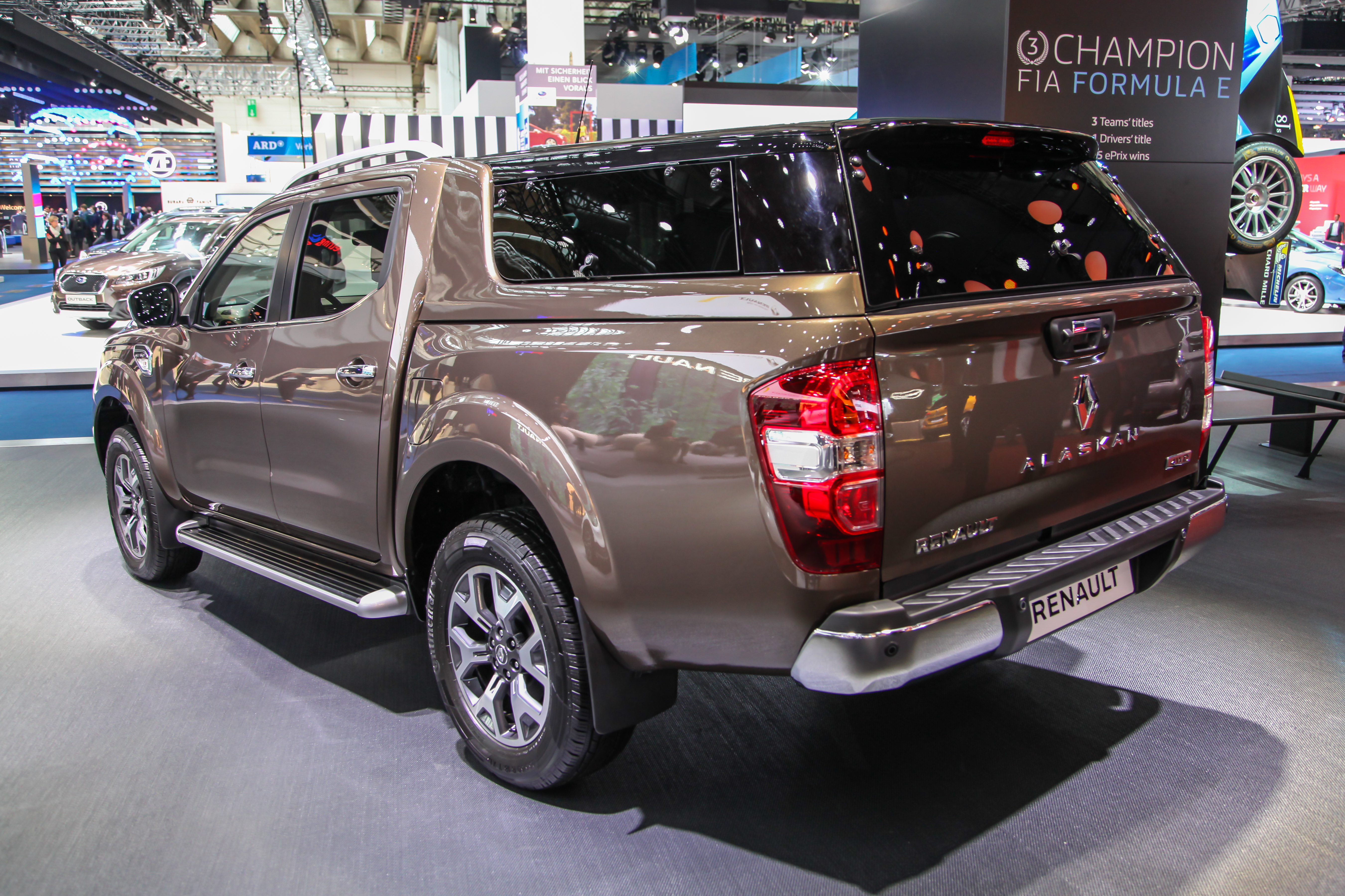 Renault Alaskan